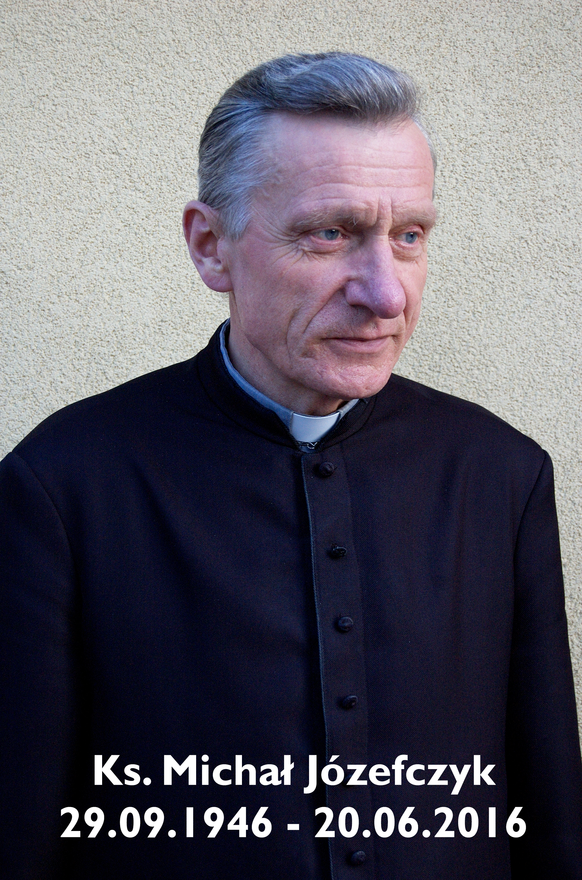 Autorem zdjęcia jest Rafał Tracz, wieloletni współpracownik ks. Michała. Zdjęcie wykonane 10.03.2009 roku na tle plebani